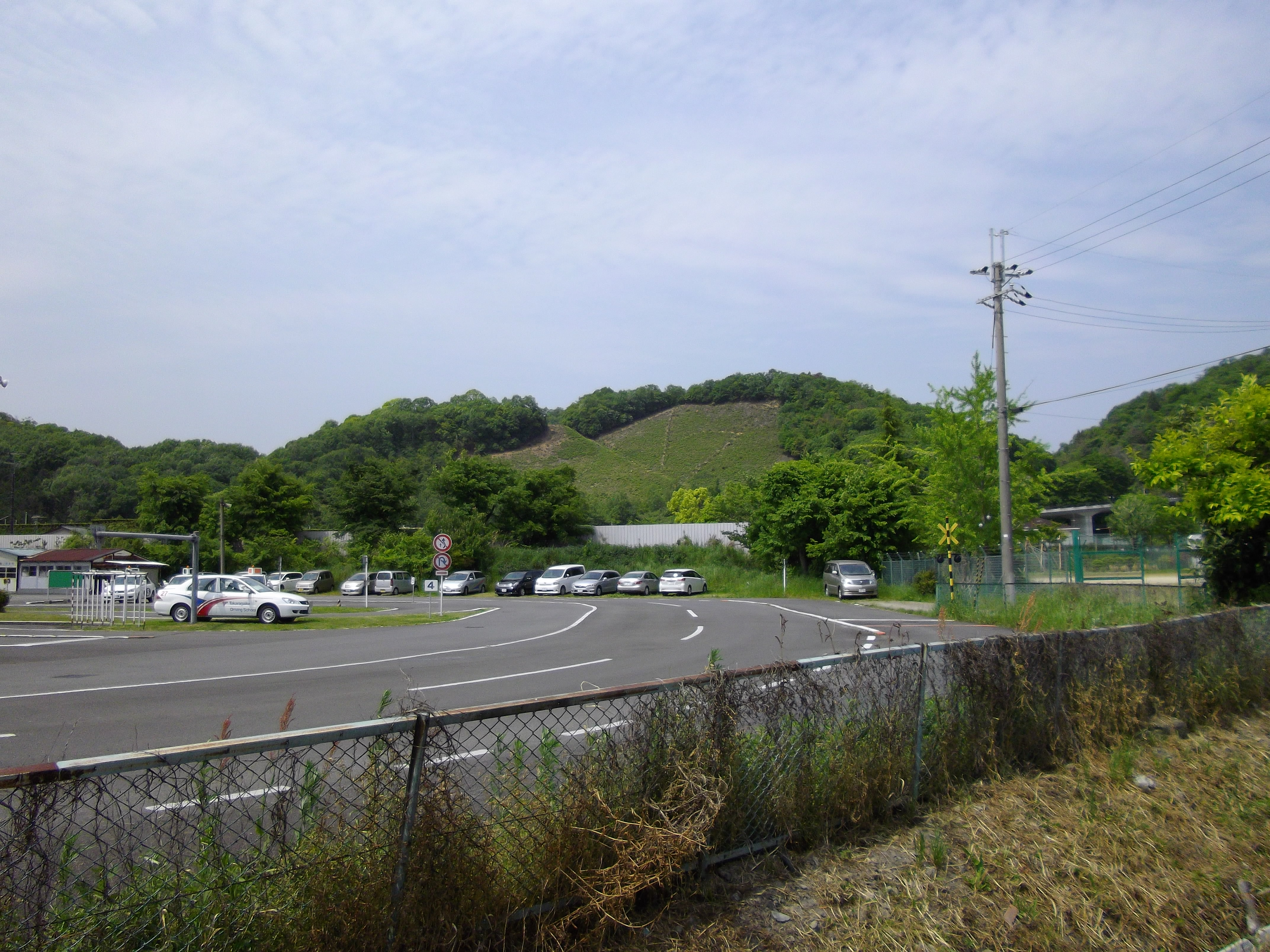 北山通やや北から見た妙。